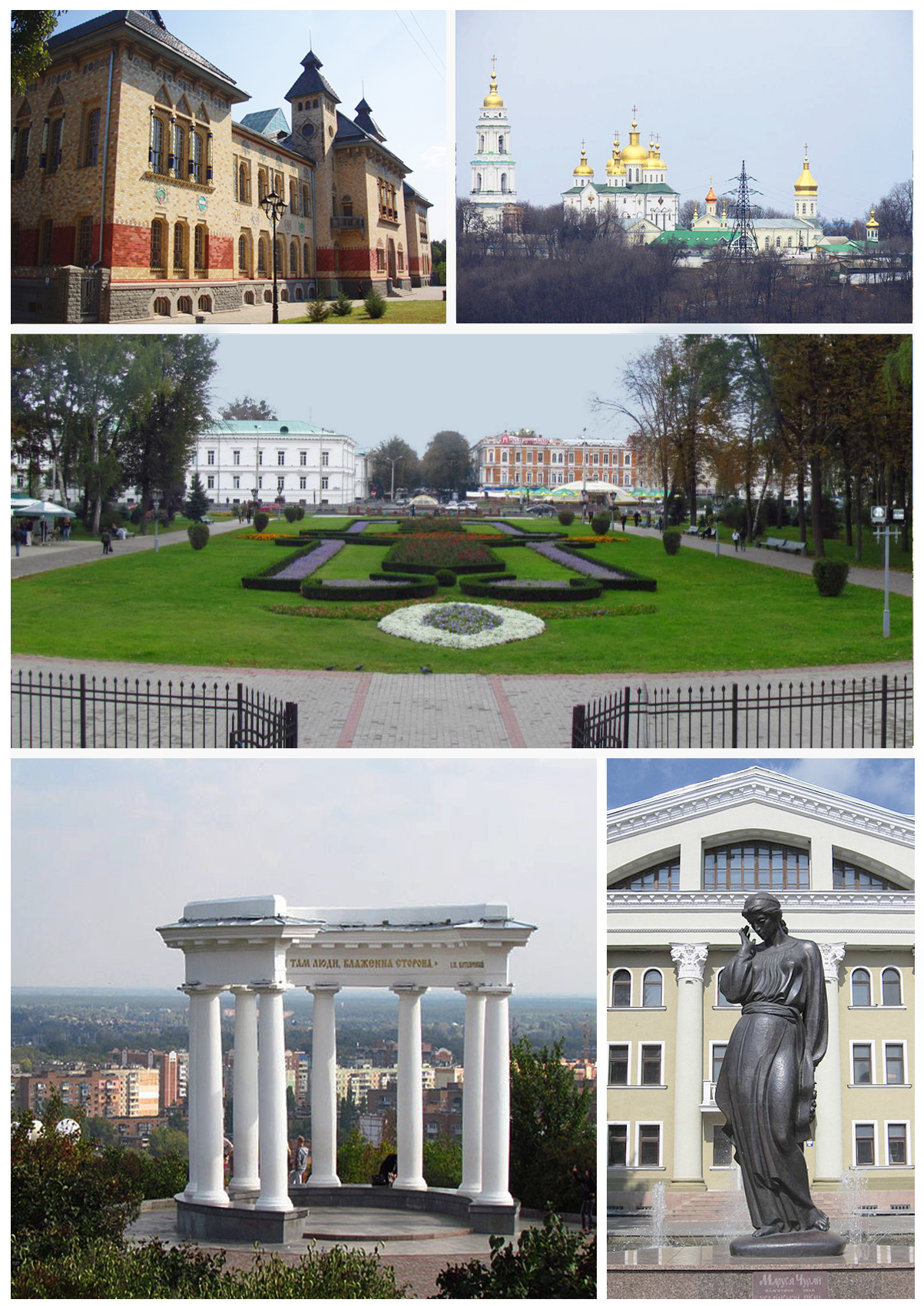 Верхній рад: Полтавський краєзнавчий музей; Свято-Хрестовоздвиженський жіночий монастир. Середній ряд: фрагмент Круглої площі. Нижній ряд: Біла альтанка, пам'ятник Марусі Чурай.